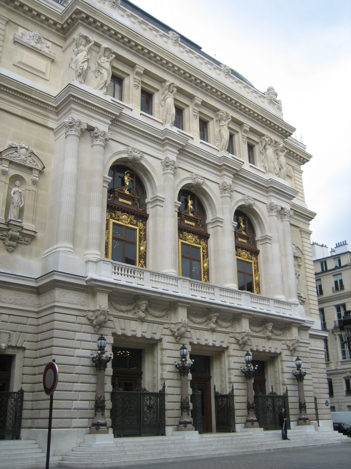 Théâtre National de l'Opéra-Comique ("Salle Favart"); Paris.